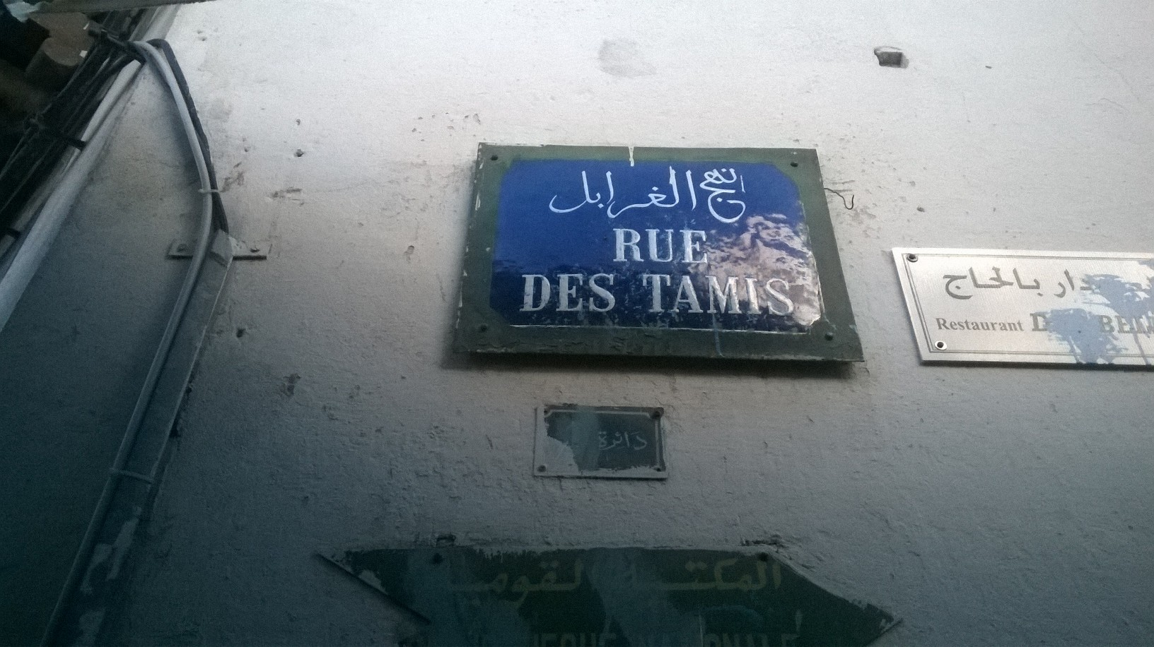 la médina de Tunis